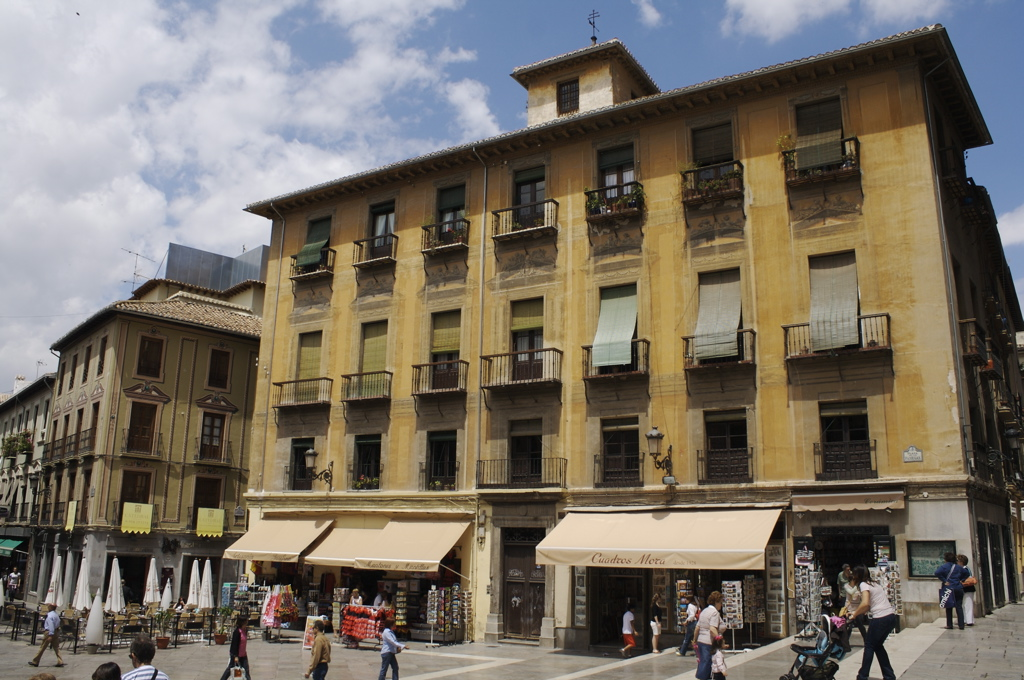 Granada